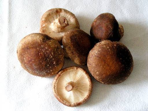 Fresh Lentinula edodes (shiitake) mushrooms